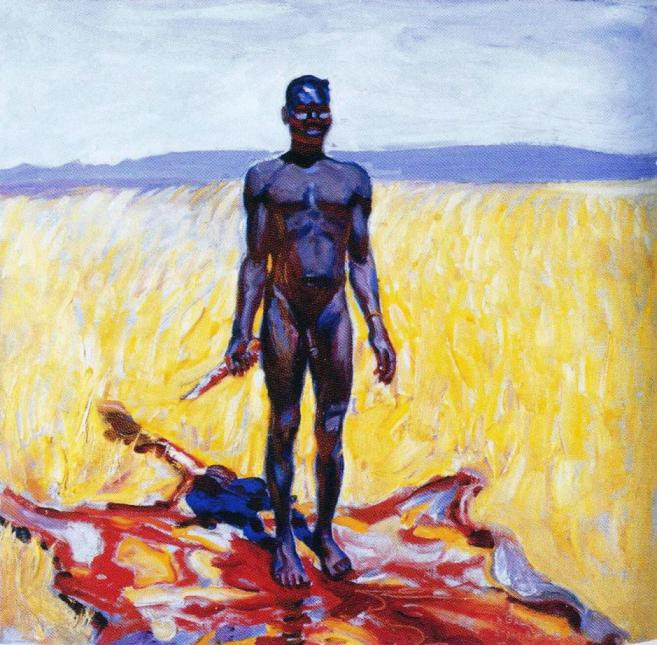 Akseli Gallen-Kallelan maalaus Homo victor eli Voittoisa ihminen, maalattu Brittiläisessä Itä-Afrikassa, nykyisessä Keniassa. Maalaus esittää maasai- tai kikuju-heimon metsästäjää. Kuuluu yksityiskokoelmaan.